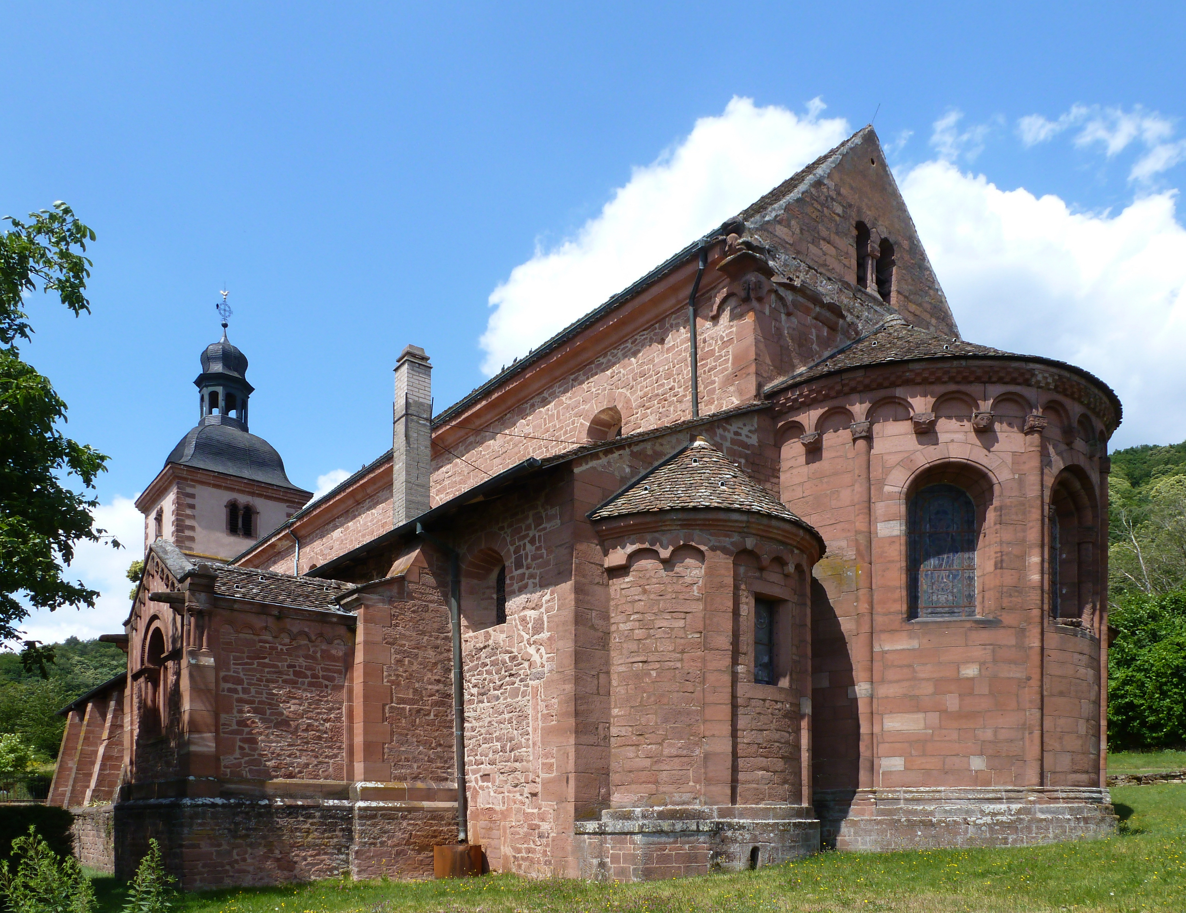 Ancienne abbatiale Saint Jean Baptiste à Saint-Jean-Saverne (Bas-Rhin, Alsace)